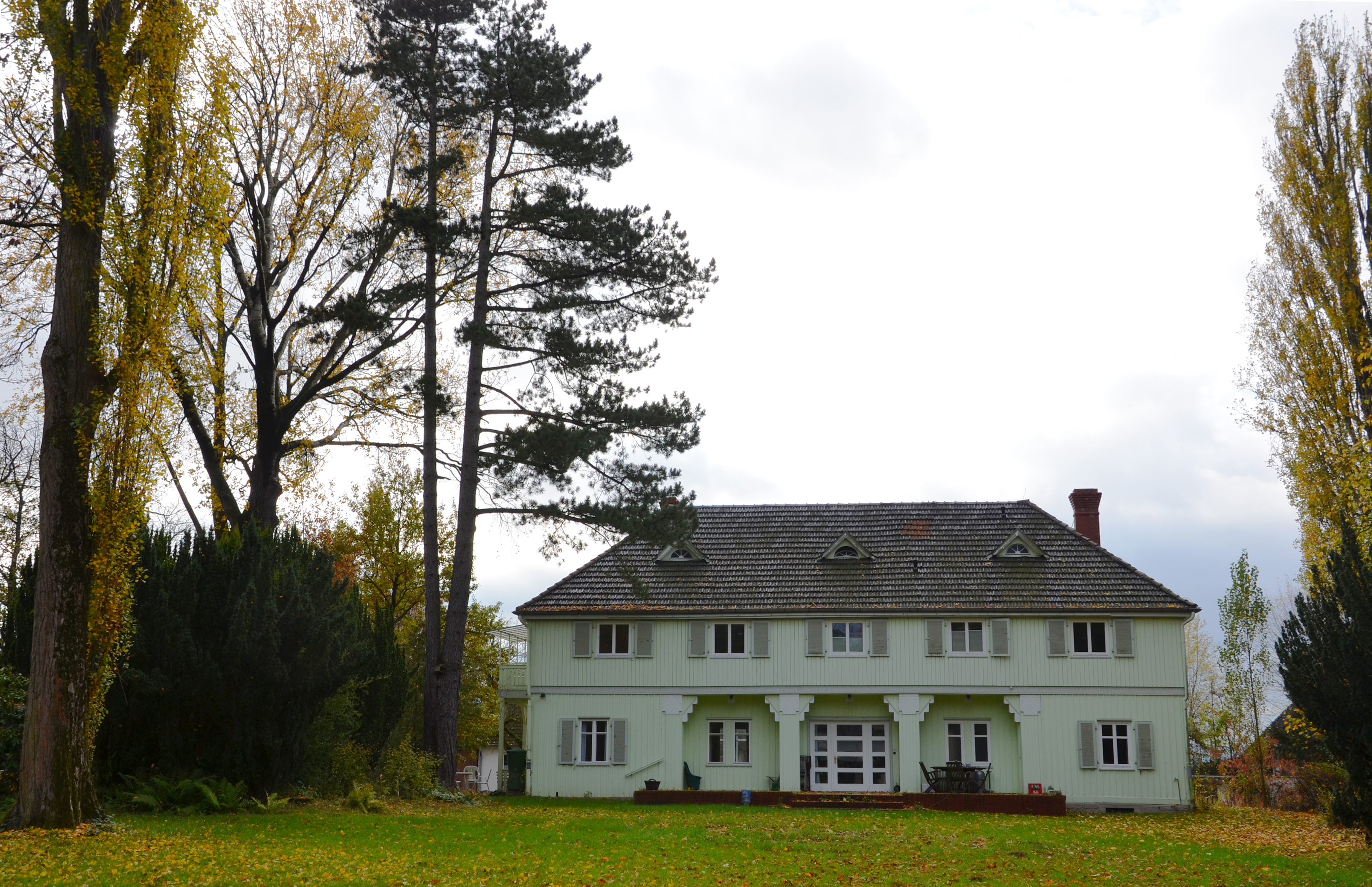 Der 1920 von der Familie des Möbelherstellers und Freimaurers Hermann Rexhausen bezogene Sommersitz (hier gesehen von der Parkanlage auf der Nordseite des Gebäudes) ist heute Gästhaus auf dem Kulturdenkmal Hermannshof unter der Adresse Röse 33 in 31832 Springe-Völksen ...